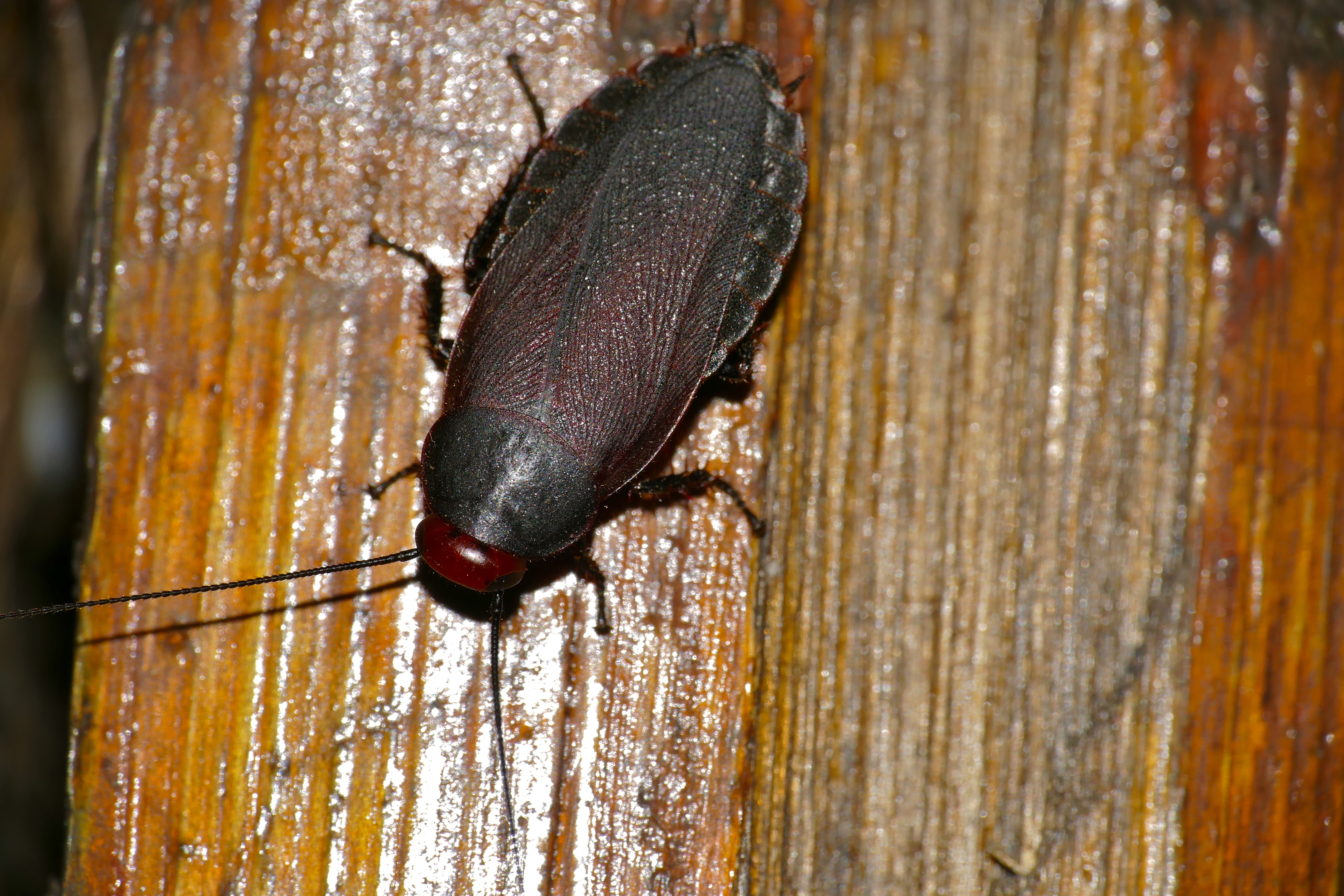 Nursery, Skukuza, Kruger NP, SOUTH AFRICA